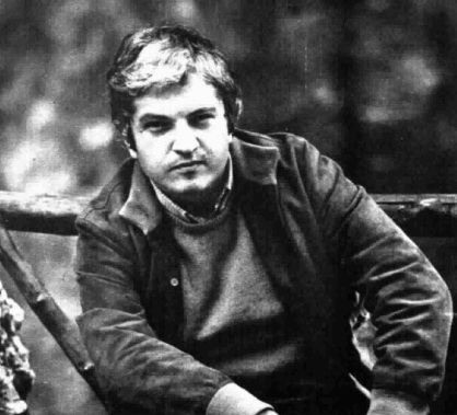 Italian singer-songwriter Bruno Lauzi